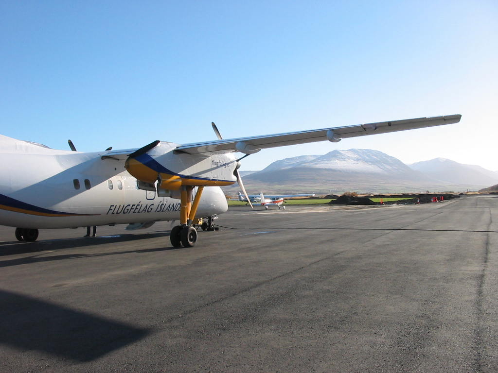 Аеропорт міста Акурейрі, північ Ісландії.